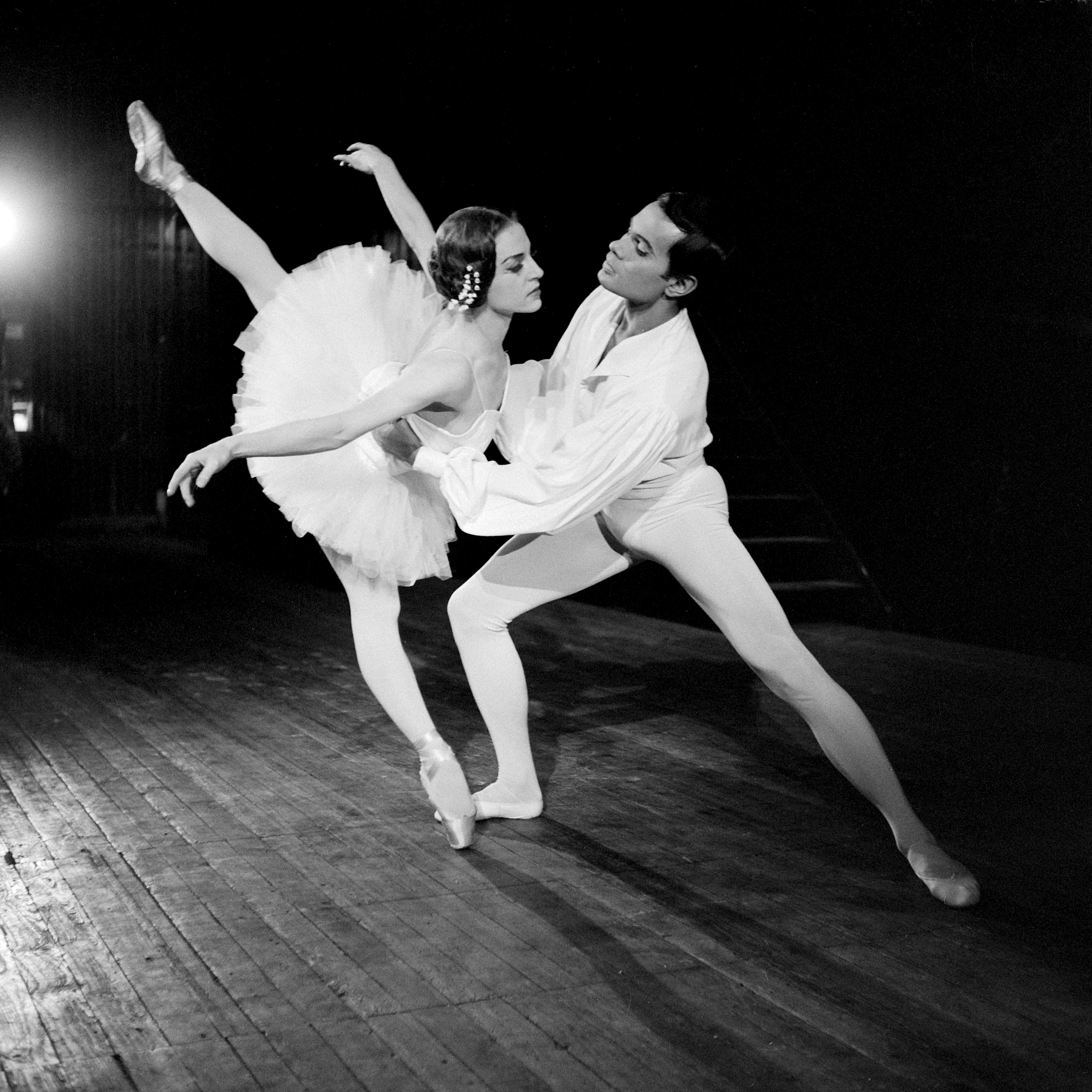 Optreden van Marianne Hilarides weer bij het Nederlands Ballet, Marianne Hilarides in haar optreden in Suite en Blanc 7 december 1960